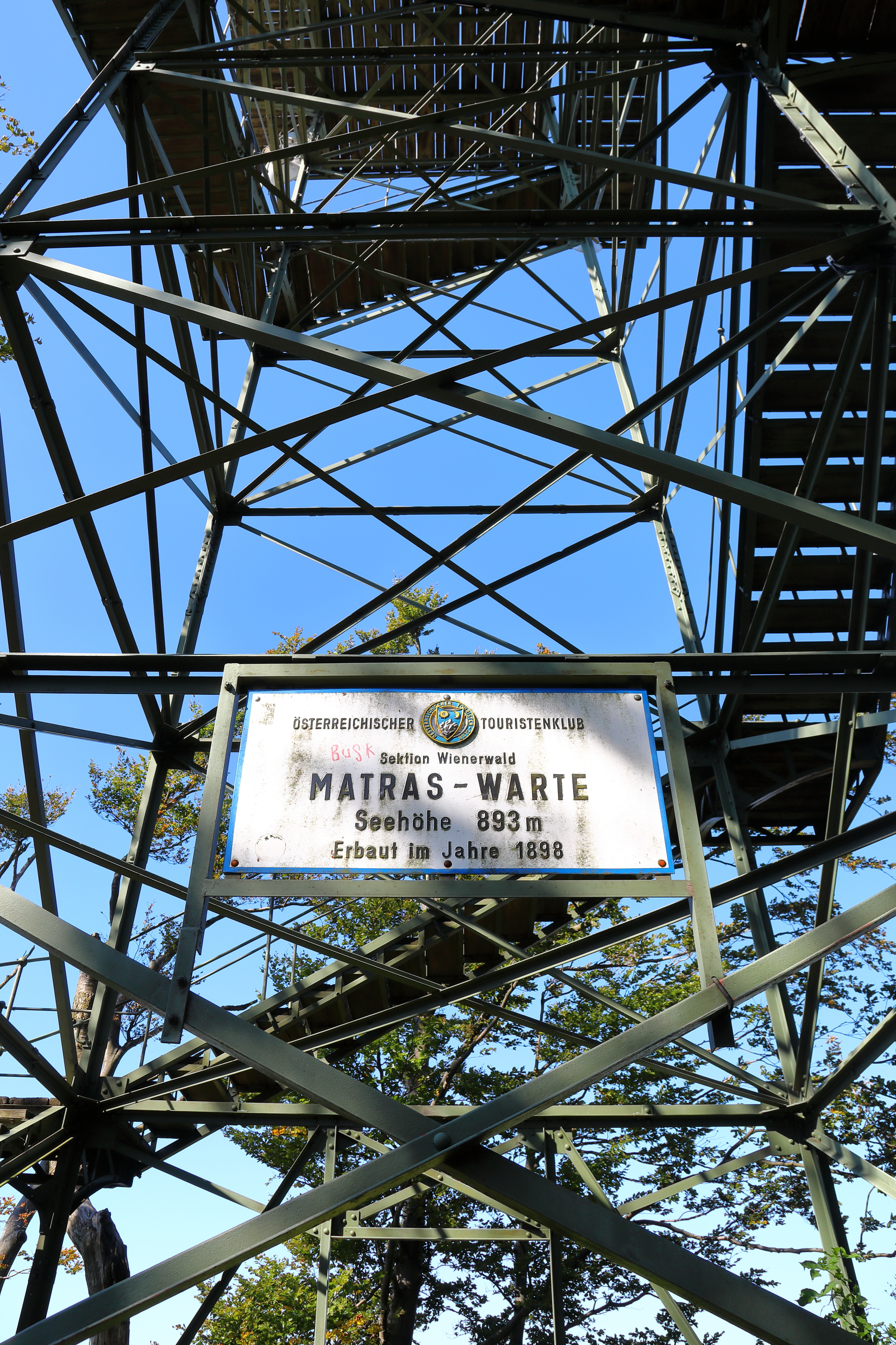 Die Matraswarte auf dem Gipfel des 893 m hohen Schöpfl und an der Gemeindegrenze der niederösterreichischen Gemeinden Brand-Laaben sowie Altenmarkt an der Triesting.Die als Eisenkonstruktion ausgeführte 17 m hohe Aussichtswarte wurde vom Österreichischen Touristenklub errichtet und anlässlich des fünfzigjährigen Regierungsjubiläum des Kaisers 1898 feierlich als „Kaiser-Franz-Joseph-Warte“ eröffnet. Im Jahr 1932, anlässlich des 70. Geburtstages von Franz Eduard Matras, Präsident des Österreichischen Touristenklubs, wurde sie in Matraswarte umbenannt.